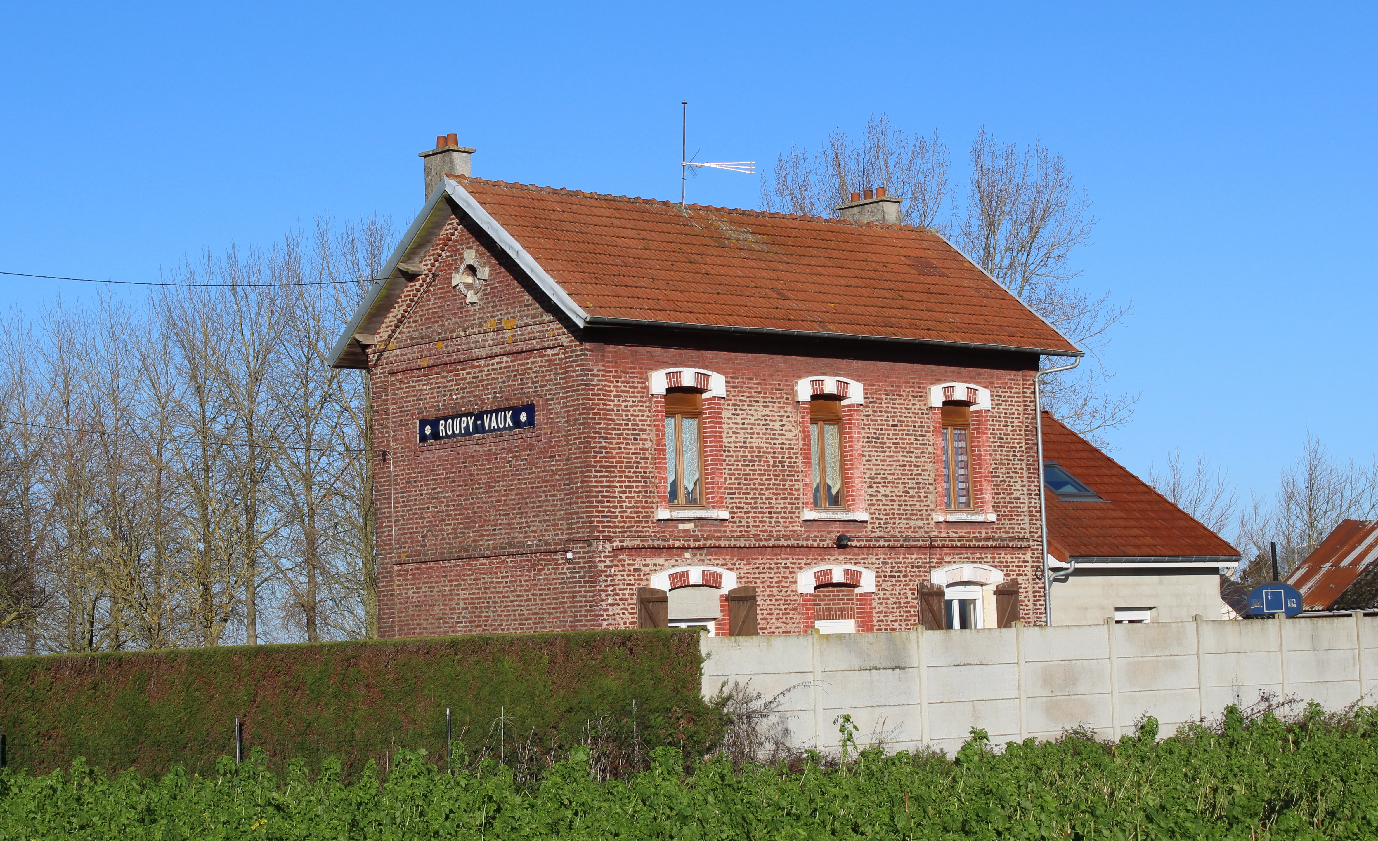 L'ancienne gare de Roupy-Vaux.